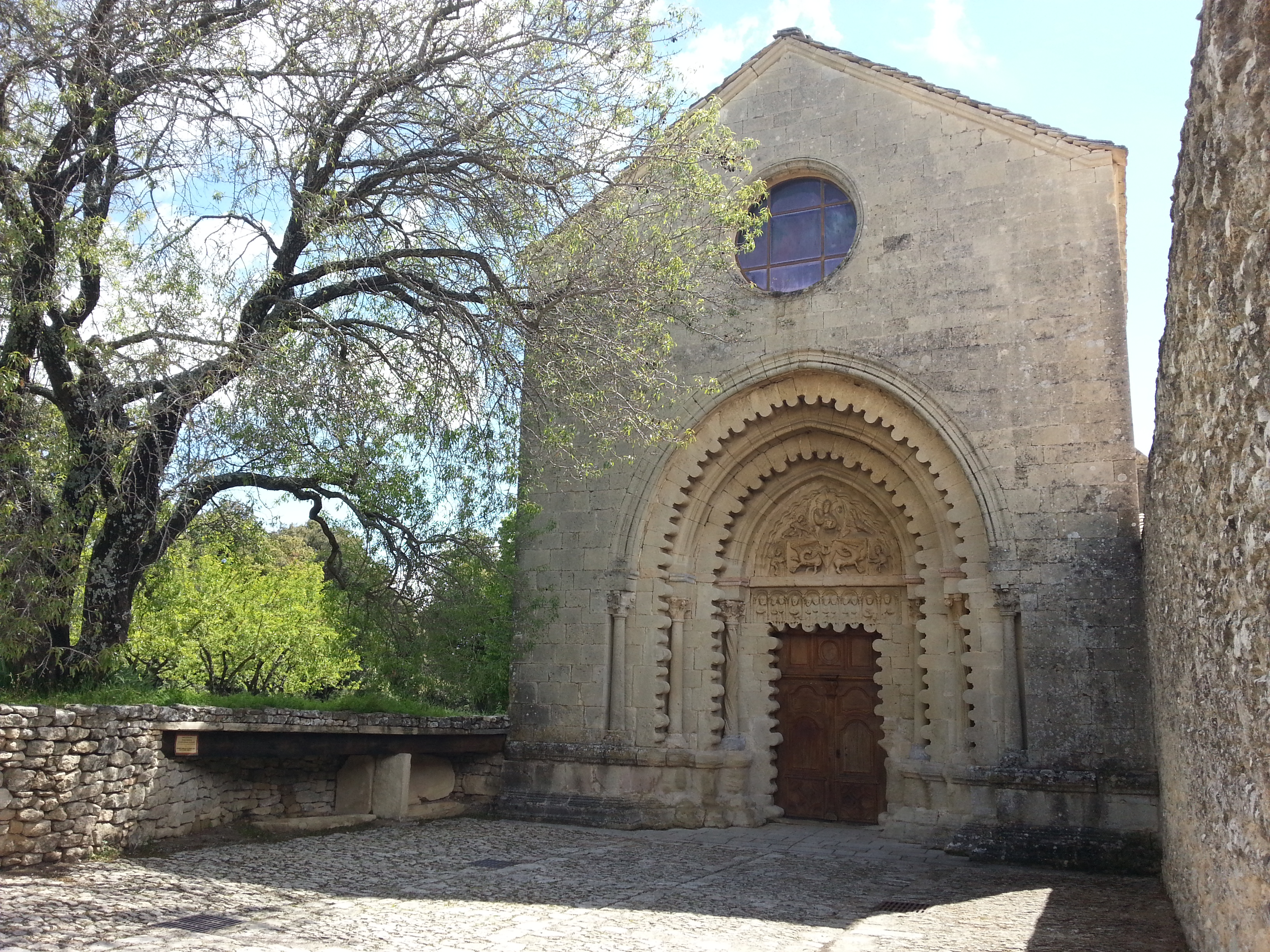 Abbaye Notre-Dame de Ganagobie.